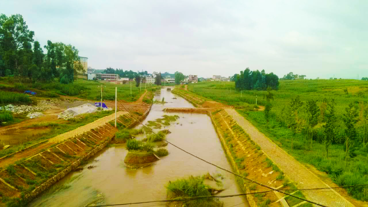 巴江石林县境内河段，拍摄于G78汕昆高速出口，面向南。